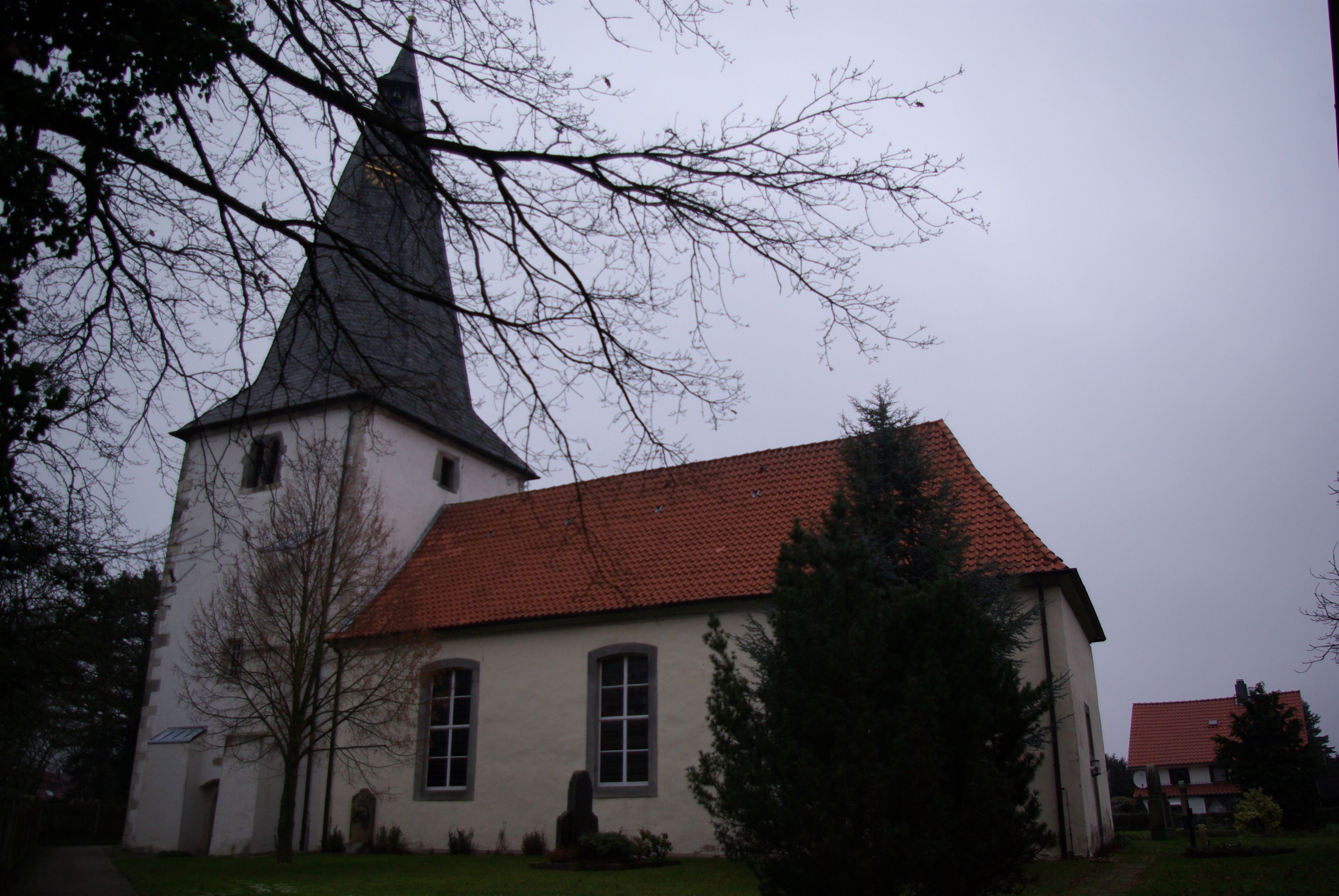 Sarstedt, Niedersachsen, im Ortsteil Hotteln die Kirche, der Friedhof liegt hinter Kirche, der Blick ist vom Eingang Kirchstraße aus (geotags in EXIF-Daten).